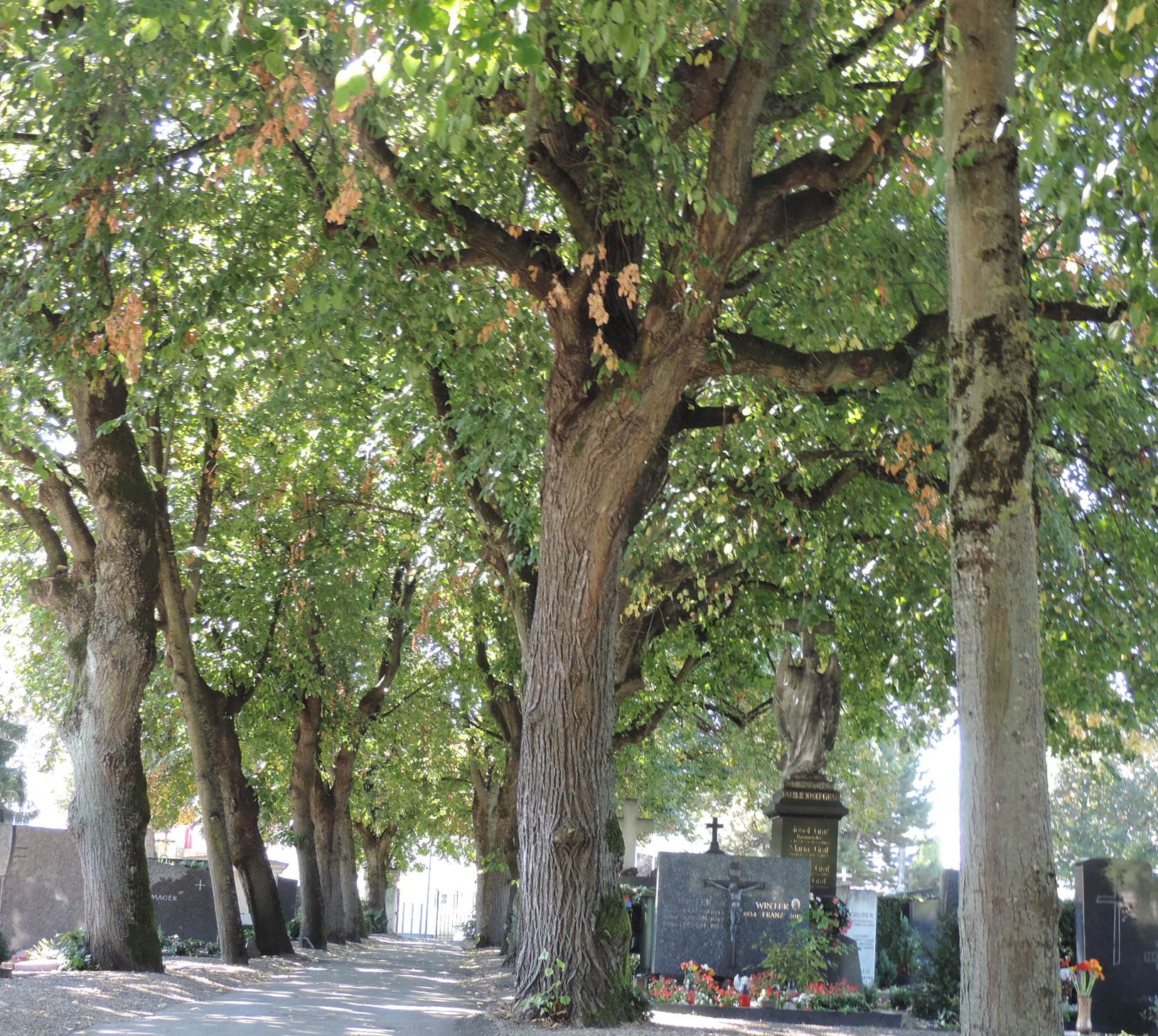 Alter Ostfriedhof Augsburg